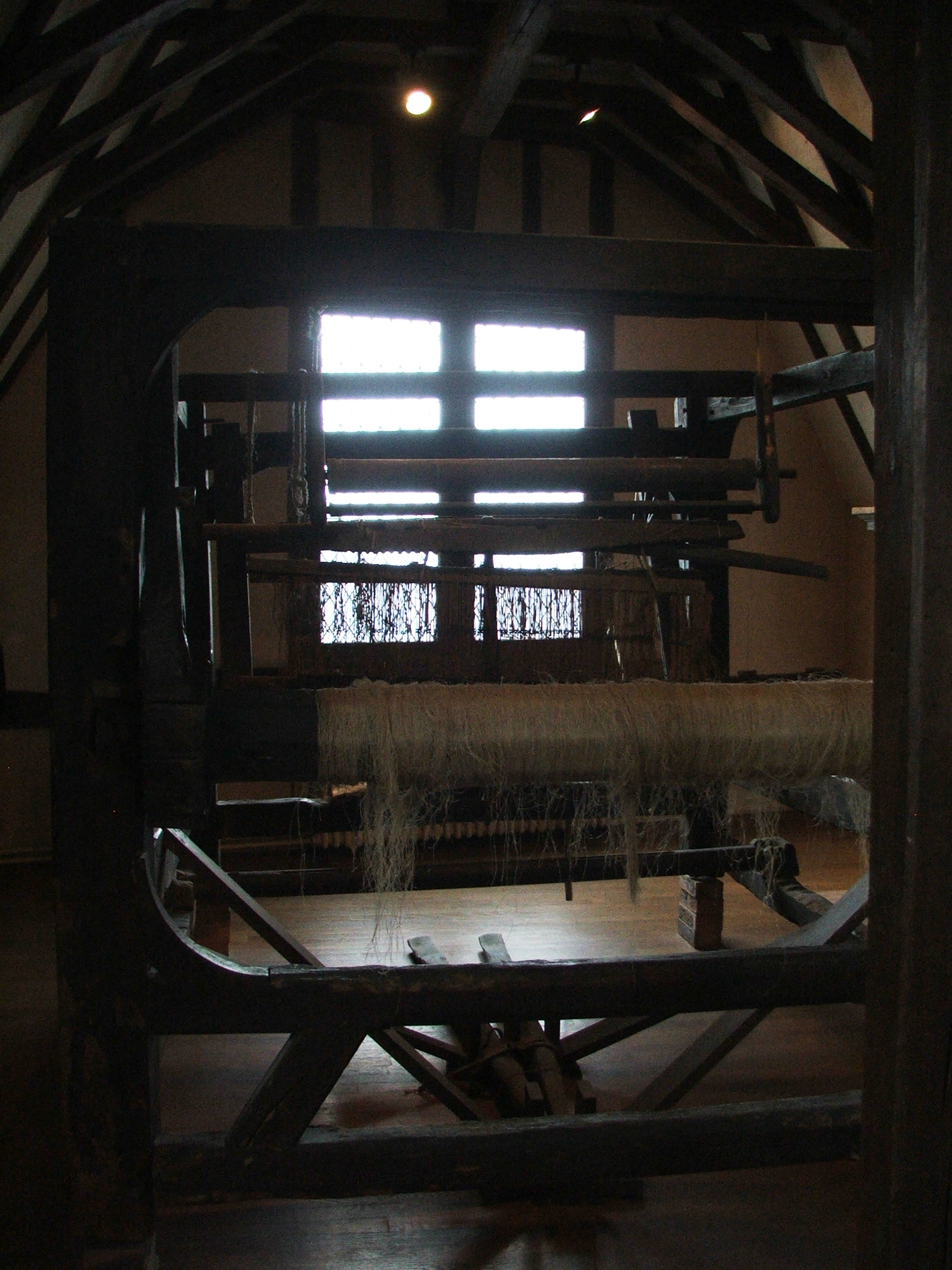 Une machine de tissage de chanvre Sarthoise, visible au musée de la Reine Bérengère au Mans.